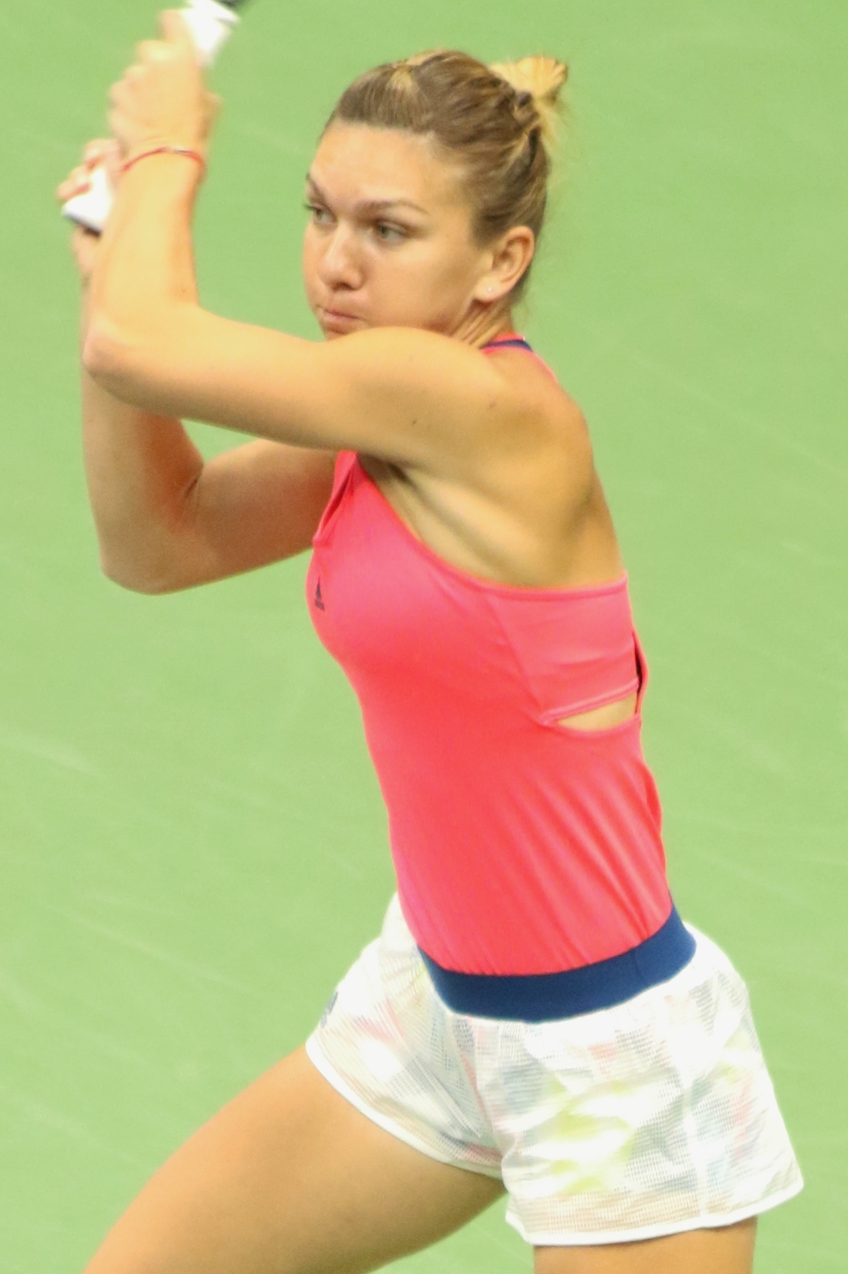 Halep US16 (52)